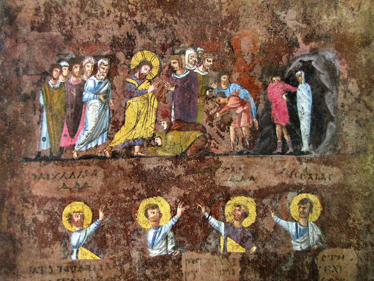 Codex Purpureus Rossanensis_Illumination